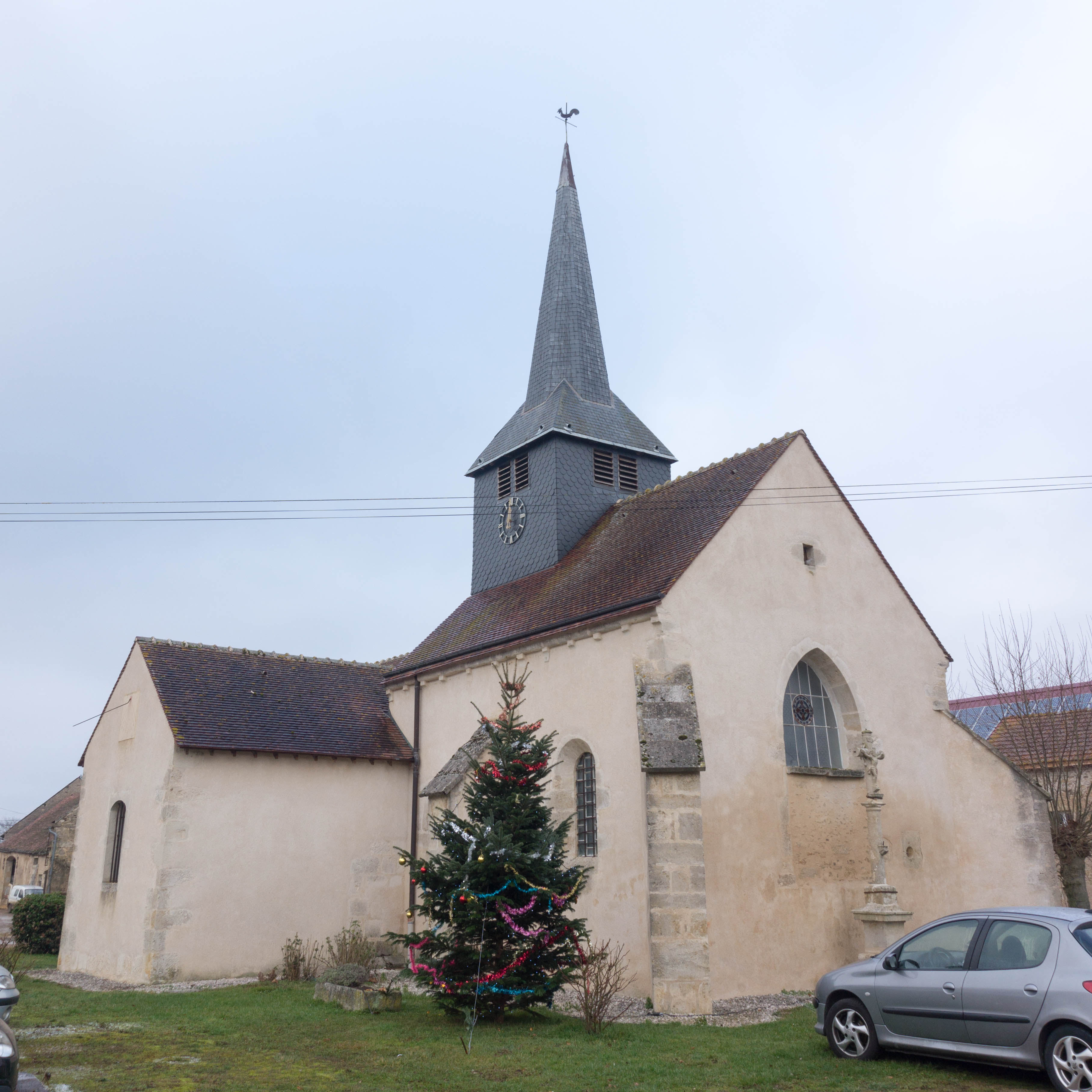 Église Saint Andoche